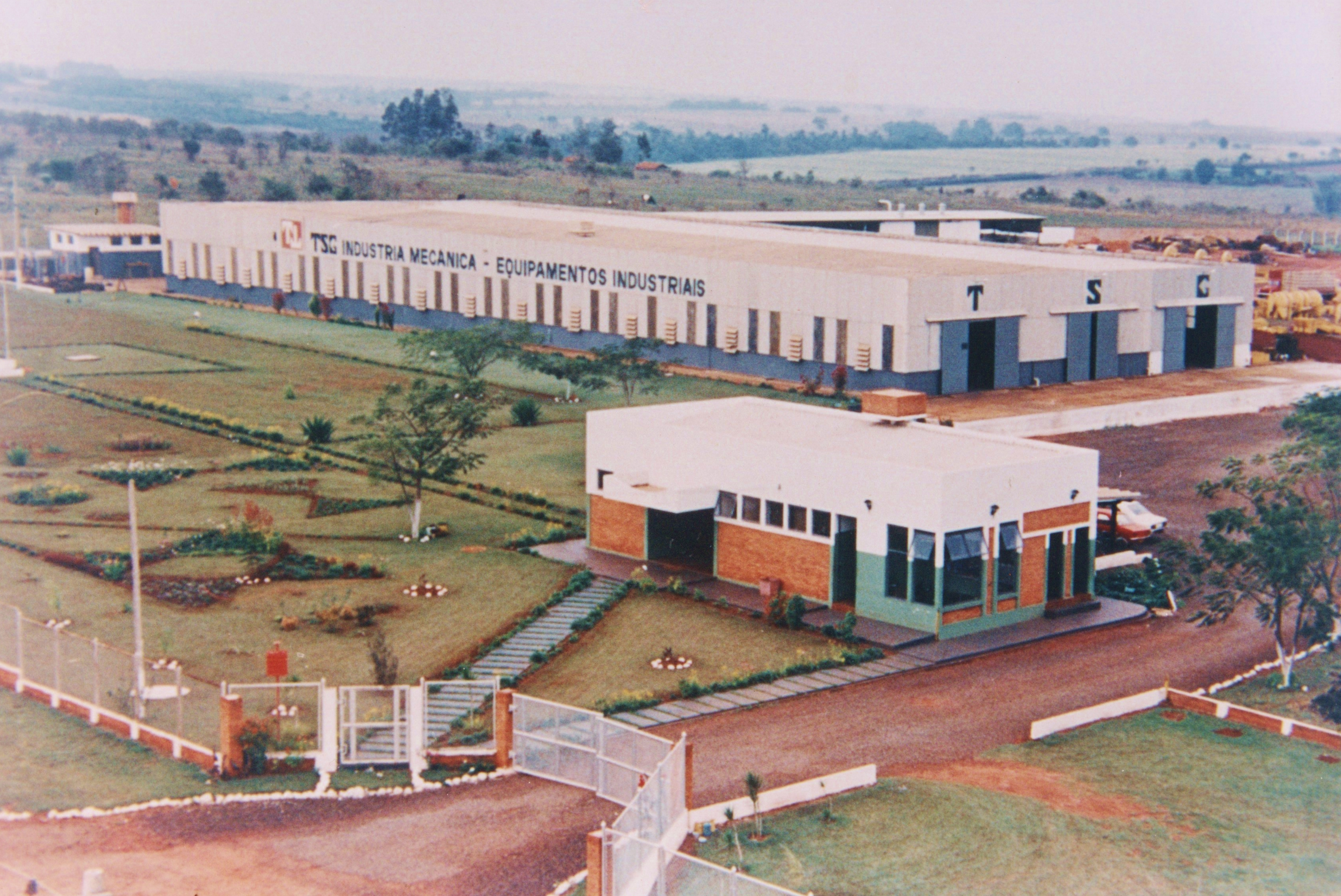 Indústria Mecânica em Salto Grande-SP. Foto tirada em 1991.